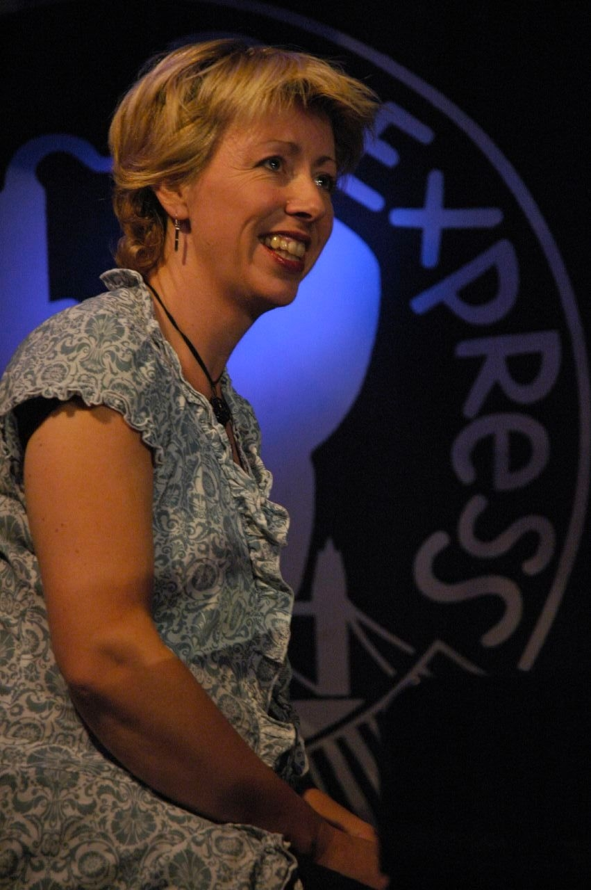 Nicki Iles